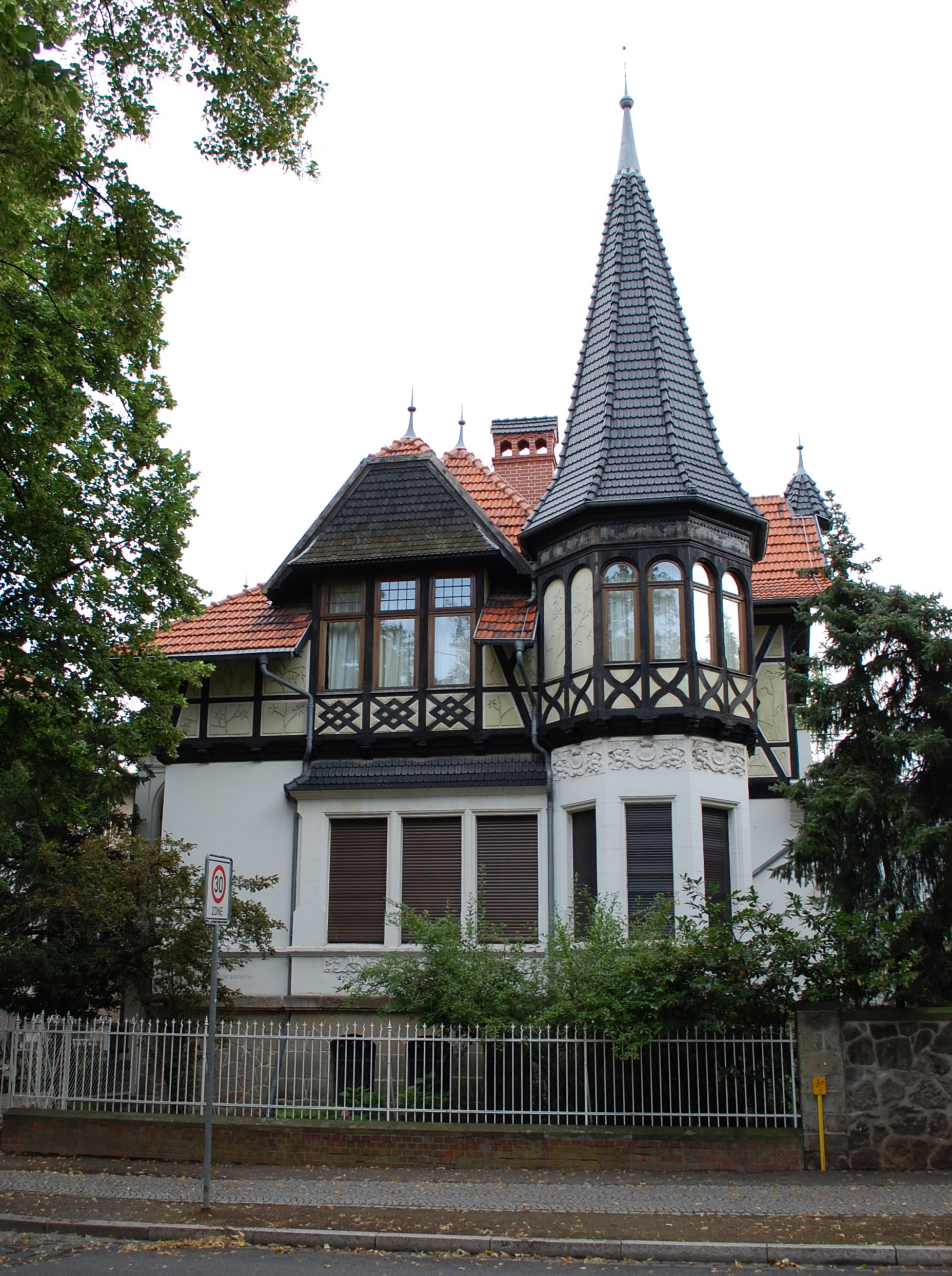 Haus Am Schiff Bleek 5 in Quedlinburg